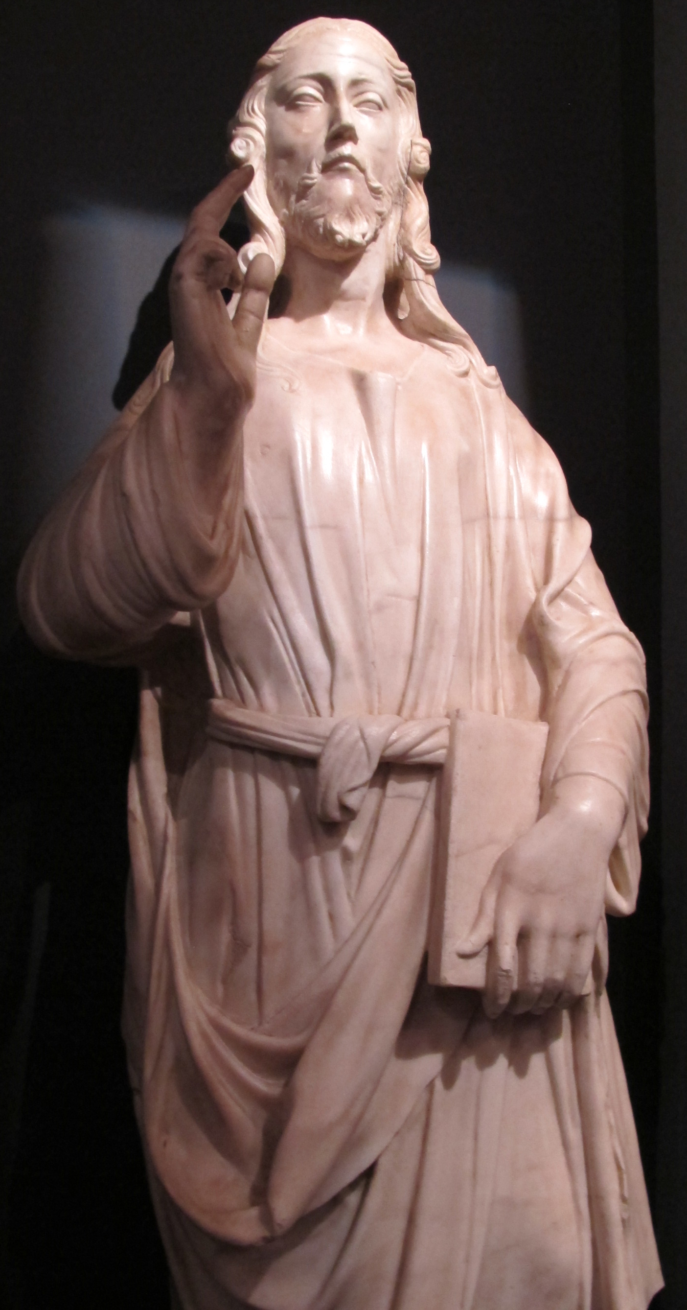 Agostino di duccio, cristo benedicente, coll. privata